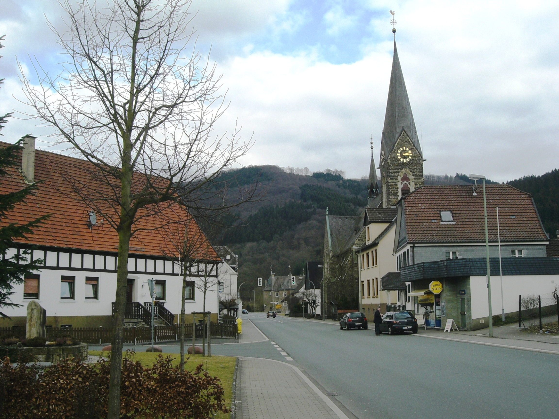 Ortsdurchfahrt Lehnhausen Finnentrop auf der B 236